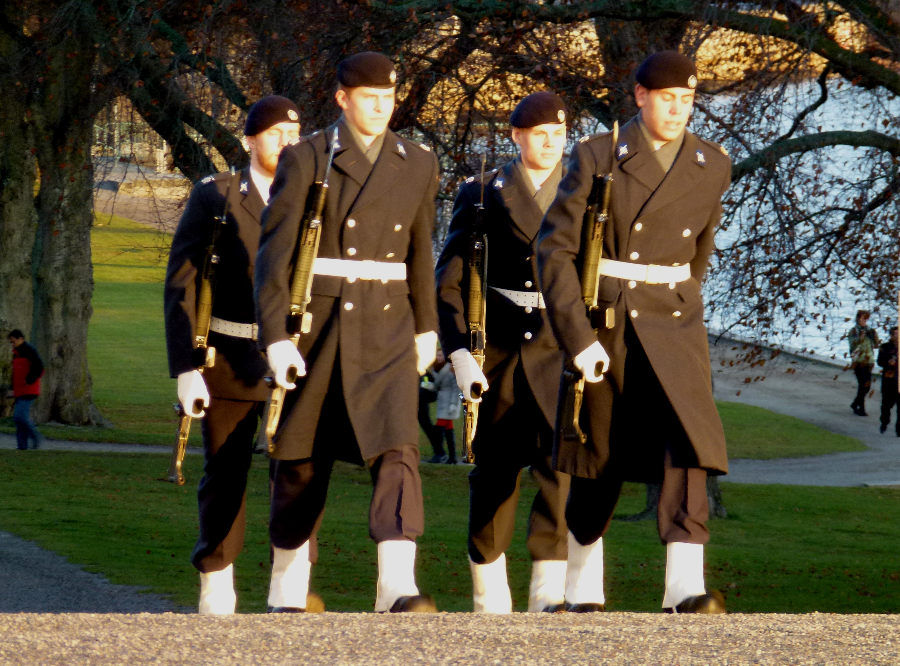 Drottningholms slott slottsvakten